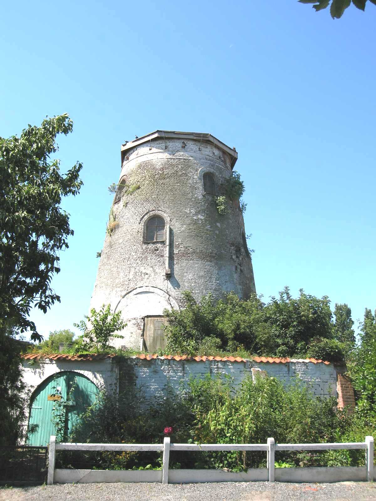 sterrestraat 60 delmerensmolenstraat